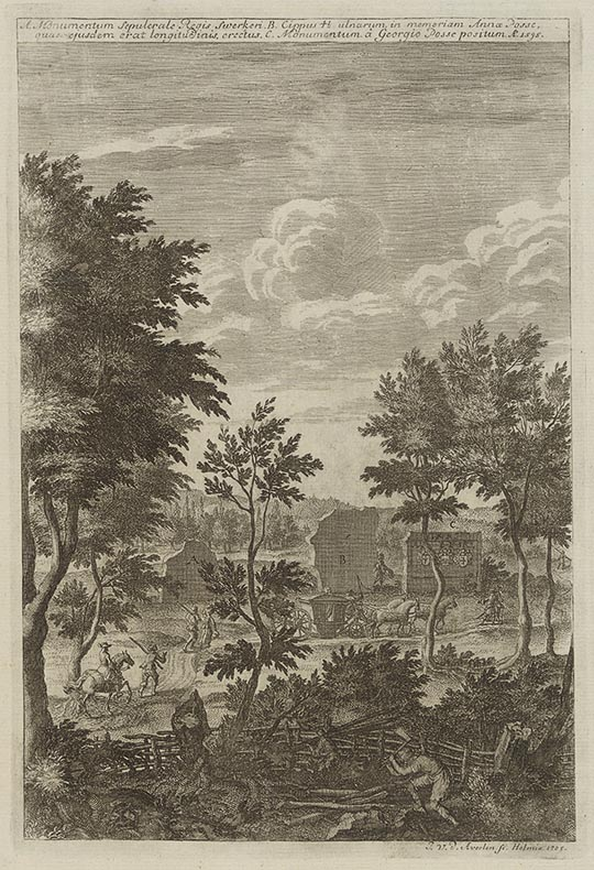 Titel i svensk övers. : A. Konung Sverkers gravvård. B. En 41/2 alnar hög gravsten till minne av Anna Posse, som hade denna längd. C. Minnessten rest av Göran Posse år 1595